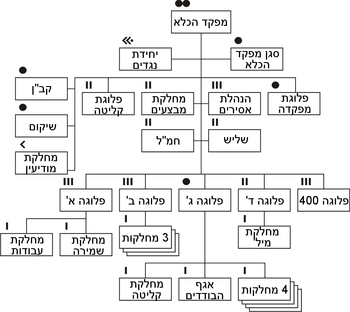 כלא 4